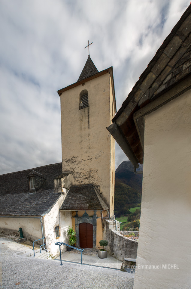 L'église d'Aydius est inscrite à l'Inventaire des Monuments Historiques